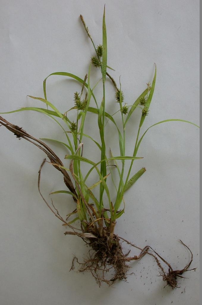 2003/06/02 和歌山県田辺市：Tanabe City. Wakayama Pref. Japan